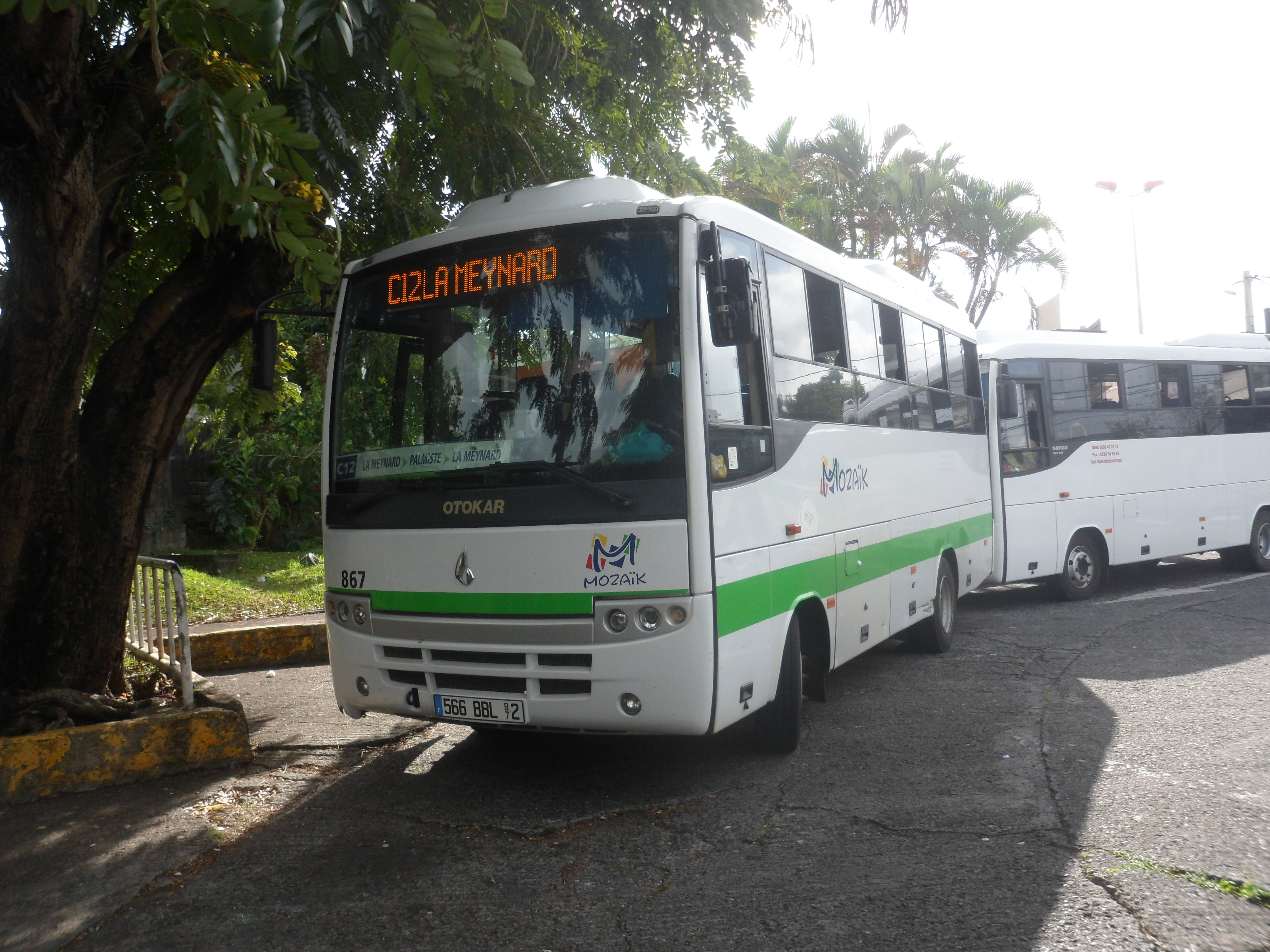 La ligne C12 à son terminus Petit Manoir sur la commune du Lamentin. A partir de Septembre 2012, la ligne C12 deviendra la ligne 426.